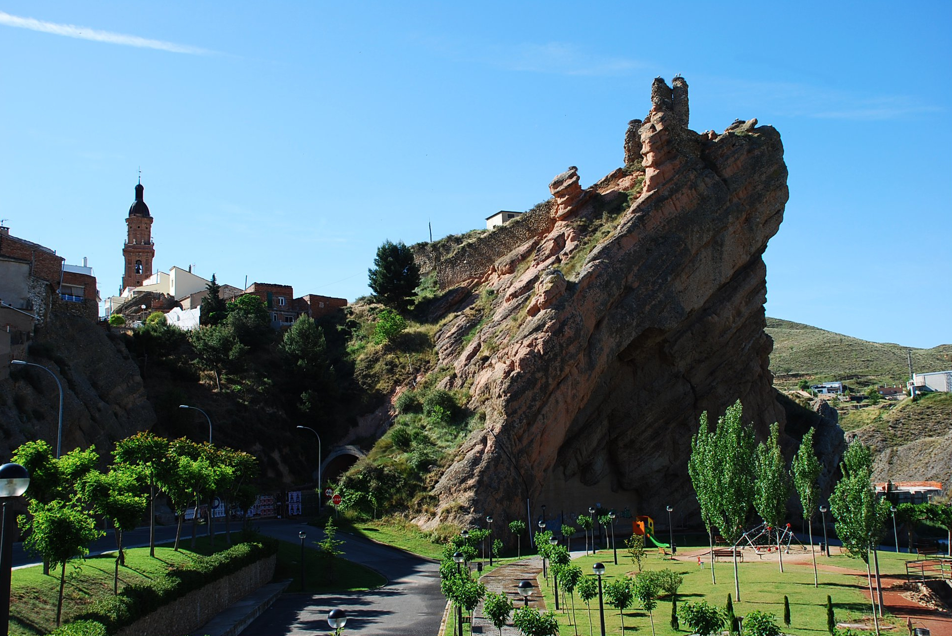 Vista de Autol desde el parque